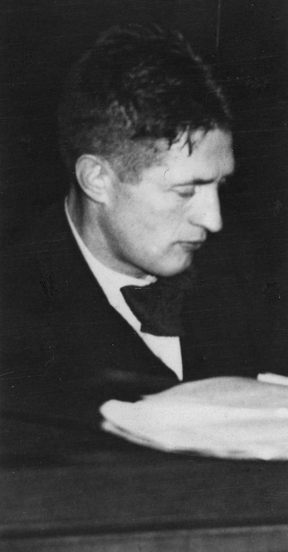 portrett, mann, overrettssakfører, brystbilde, halvprofil.